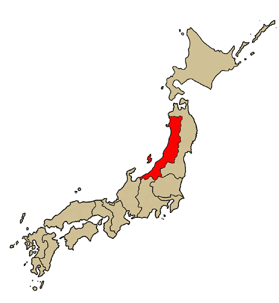 Mappa della diocesi cattolica di Niigata, in Giappone. Lavoro personale.